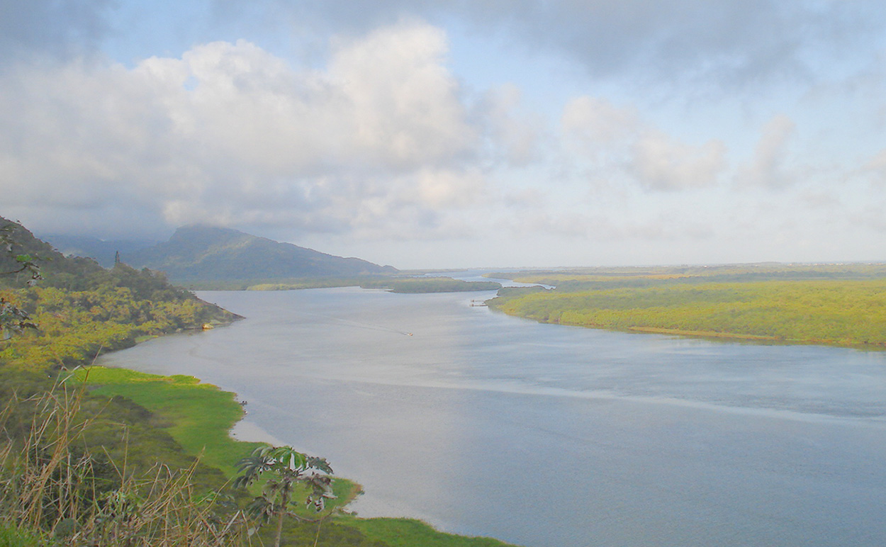 Com mais 50 metros de altitude, em um local privilegiado, o Parque Municipal do Morro do Espia, tem esse nome porque era usado por vigias que controlavam a entrada e saída de embarcações no porto e alertavam a população quando da chegada de piratas. Hoje esse ponto é muito visitado devido à visão panorâmica única da cidade e de todo o Complexo Estuarino-Lagunar, bem como da totalidade do Valo Grande, propiciando assim uma melhor compreensão sobre essa obra polêmica. Nesse ponto está também uma réplica do Cristo Redentor do Rio de Janeiro.